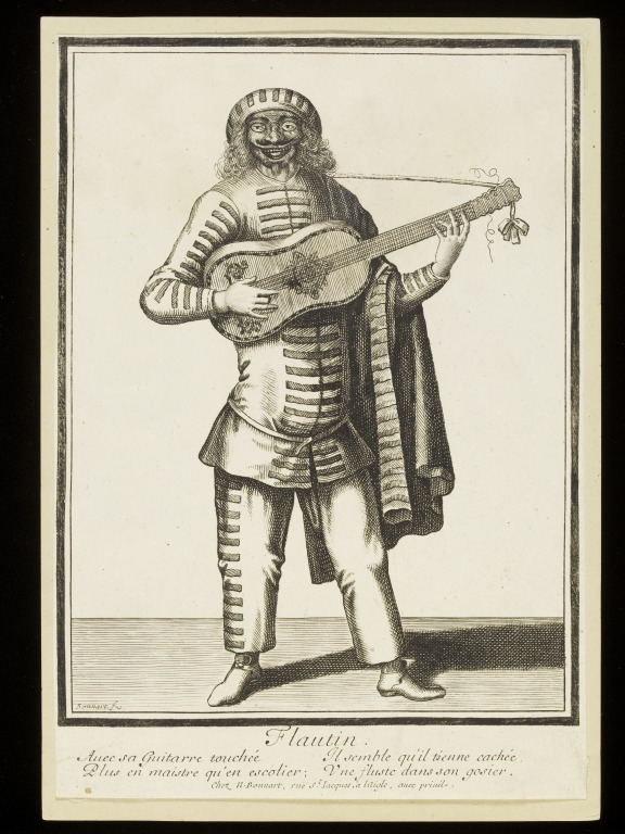 Nicolas Bonnart Flautino, incisione su rame, mm 235 x 178, Parigi, Bibliothèque nationale, Département des estampes, riprodotta in Rasi, p. 1007, e in Guardenti, II, p. 177, fig. 275